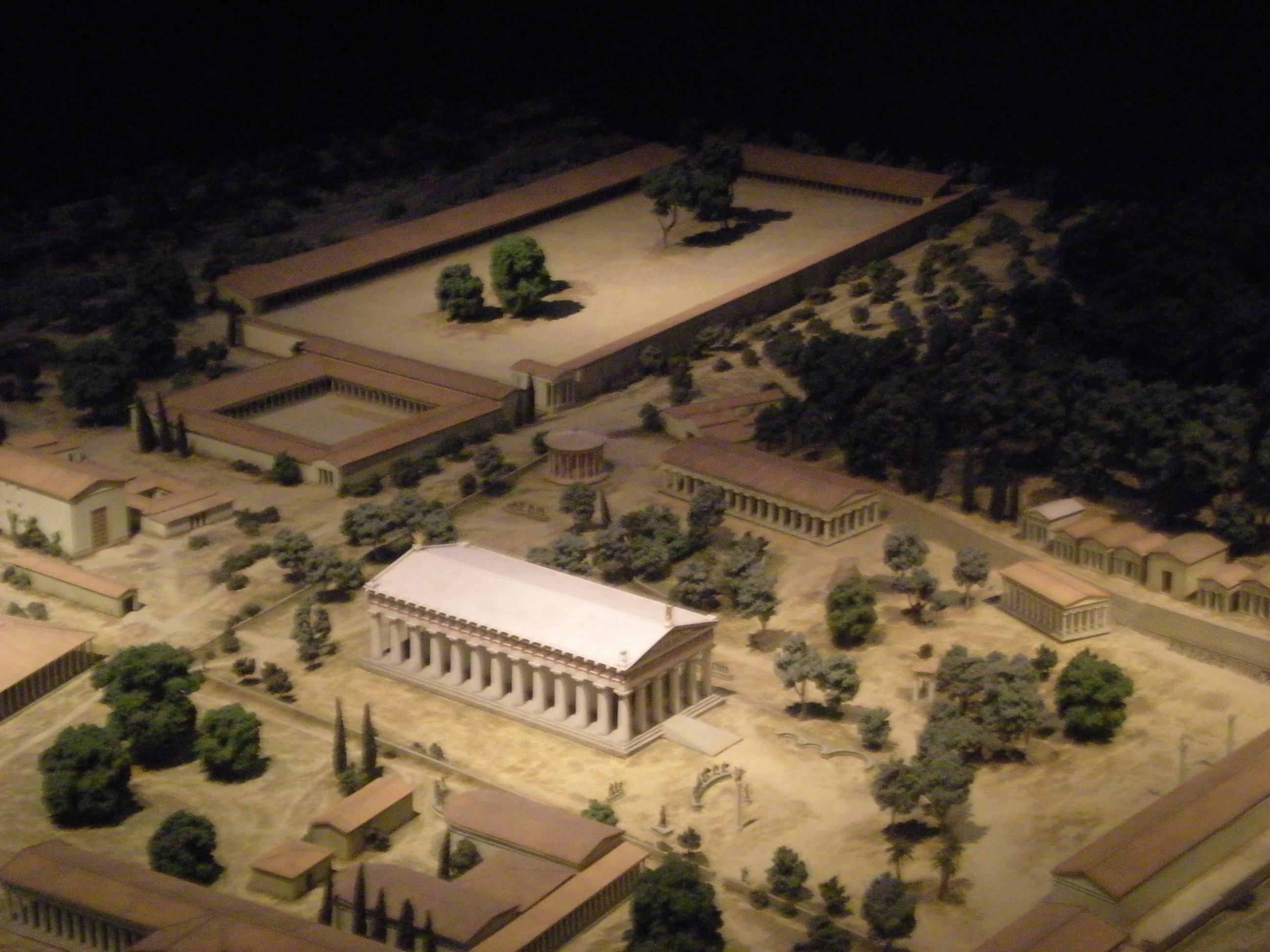 Maqueta arquitectónica del recinto del santuario de Olimpia, en Grecia. Pertenece a la exposición La belleza del cuerpo, en el MARQ. Forma parte de la exposición permanente del Museo Británico.